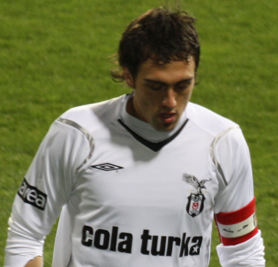 Matias Delgado 2009